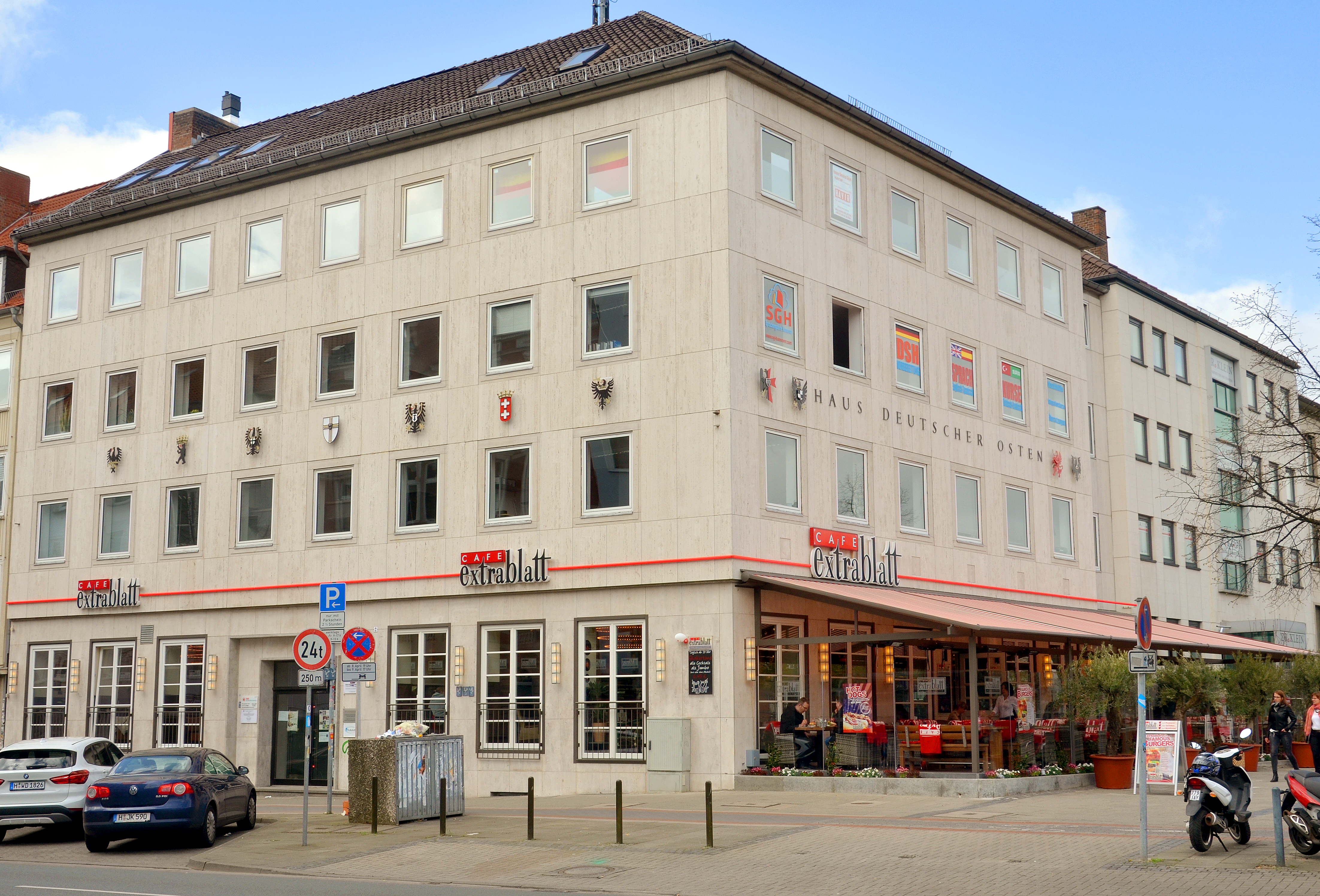 An einer Ecke des Königsworther Platzes in der Calenberger Neustadt von Hannover steht das Anfang der 1960er Jahre errichtete „Haus Deutscher Osten“ unter der Adresse Königsworther Straße 2 in 30167 Hannover. Das Gebäude, hier zu sehen mit einer im Erdgeschoss neu eröffneten Filiale der Kette Café Extrablatt, ist unter anderem Sitz des Hilfskomitees der evangelisch-lutherischen Deutschen aus Polen ...